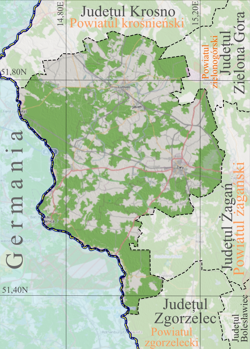 Harta de localizare a Judeţului Zary din Voievodatul Poloniei, Lubusz. Top: 51.95 Bottom: 51.3 Left: 14.6 Right: 15.35